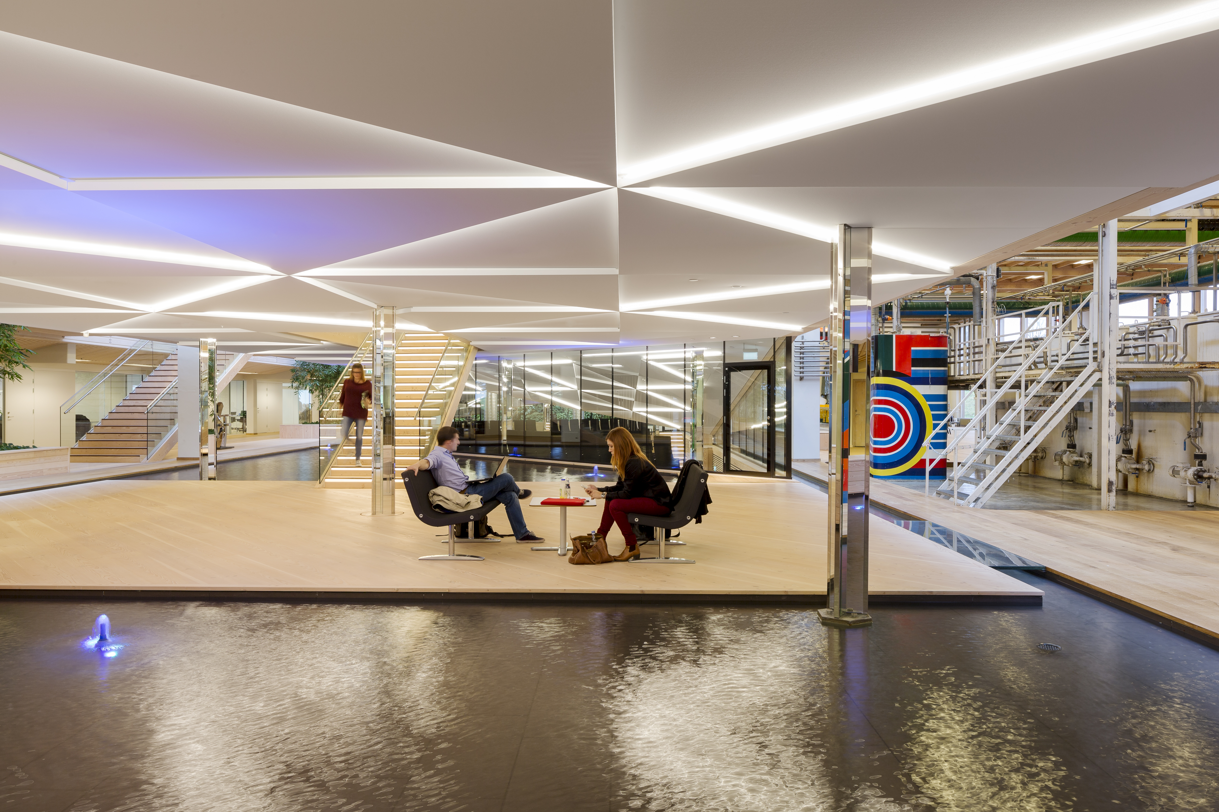 IBC Innovationsfabrikken Kolding